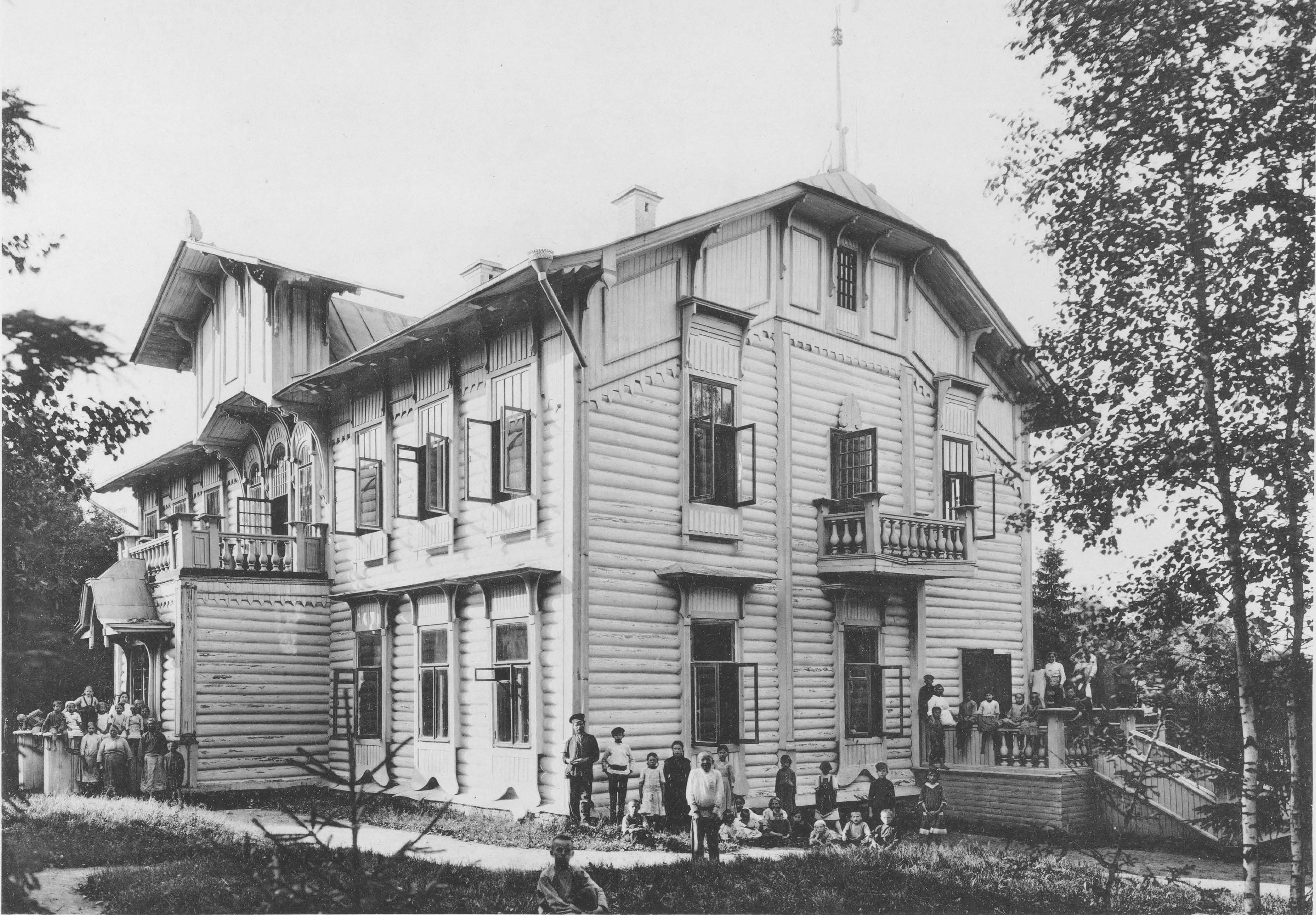 43. ДЪтская лЪтняя колонiя въ имЪнiи "ЛЪсной Городокъ" близъ Юдинской платф. Александров. ж. д.